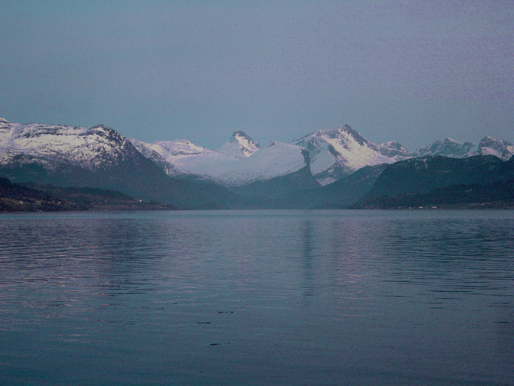 Rauma and the Rødvenfjorden (evening)